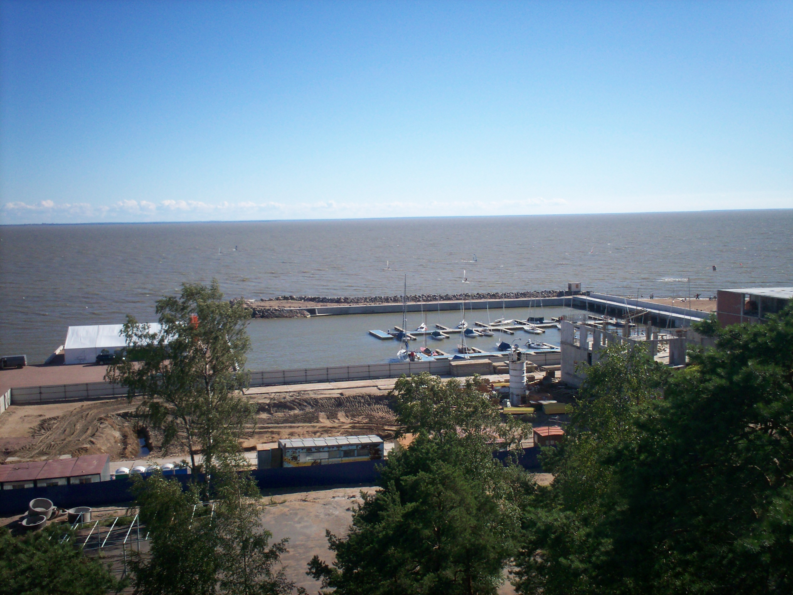 Гавань яхт-клуба в Зеленогорске